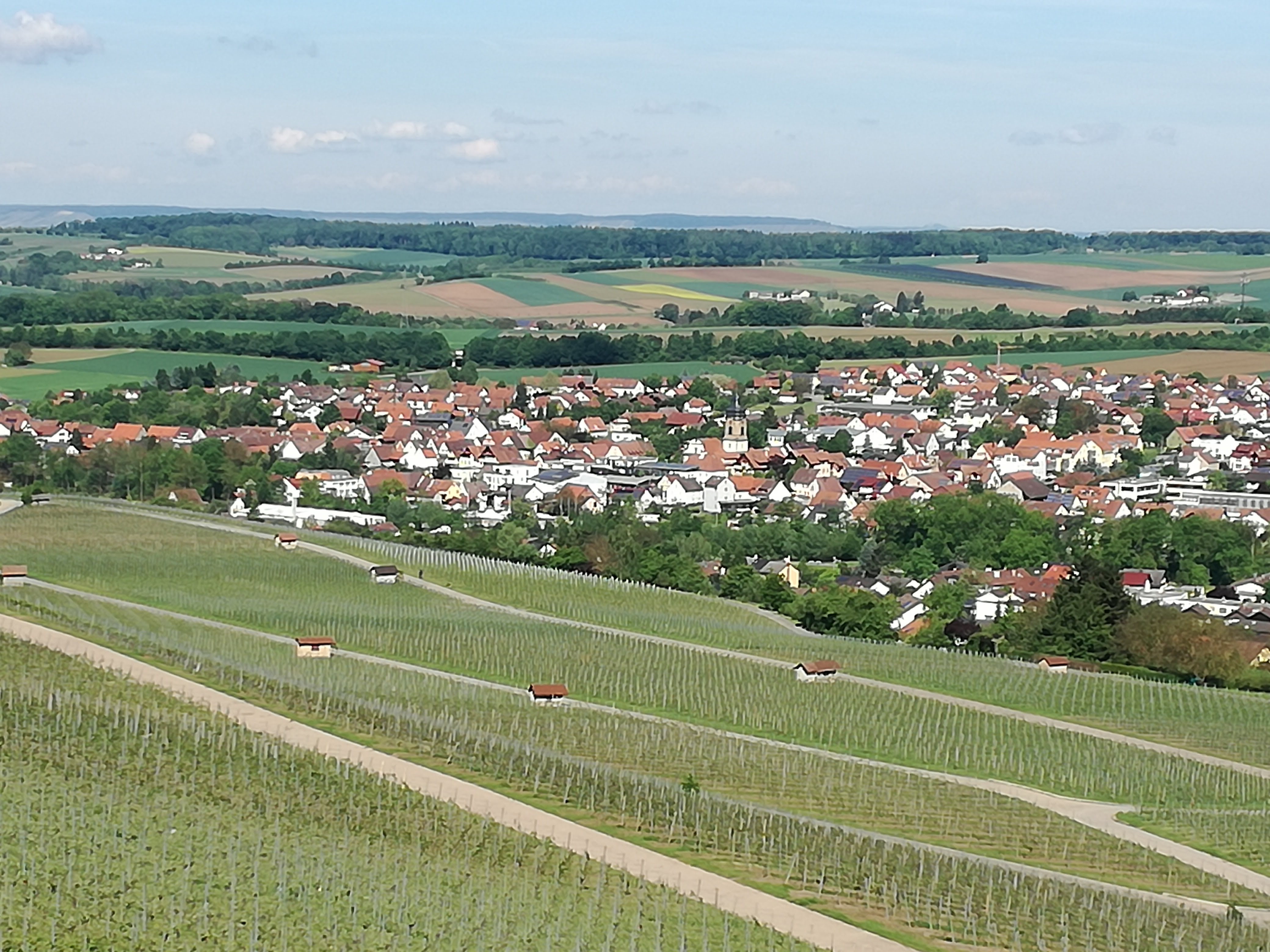 Ansicht der Stadt Abstatt im Bundesland Baden-Württemberg